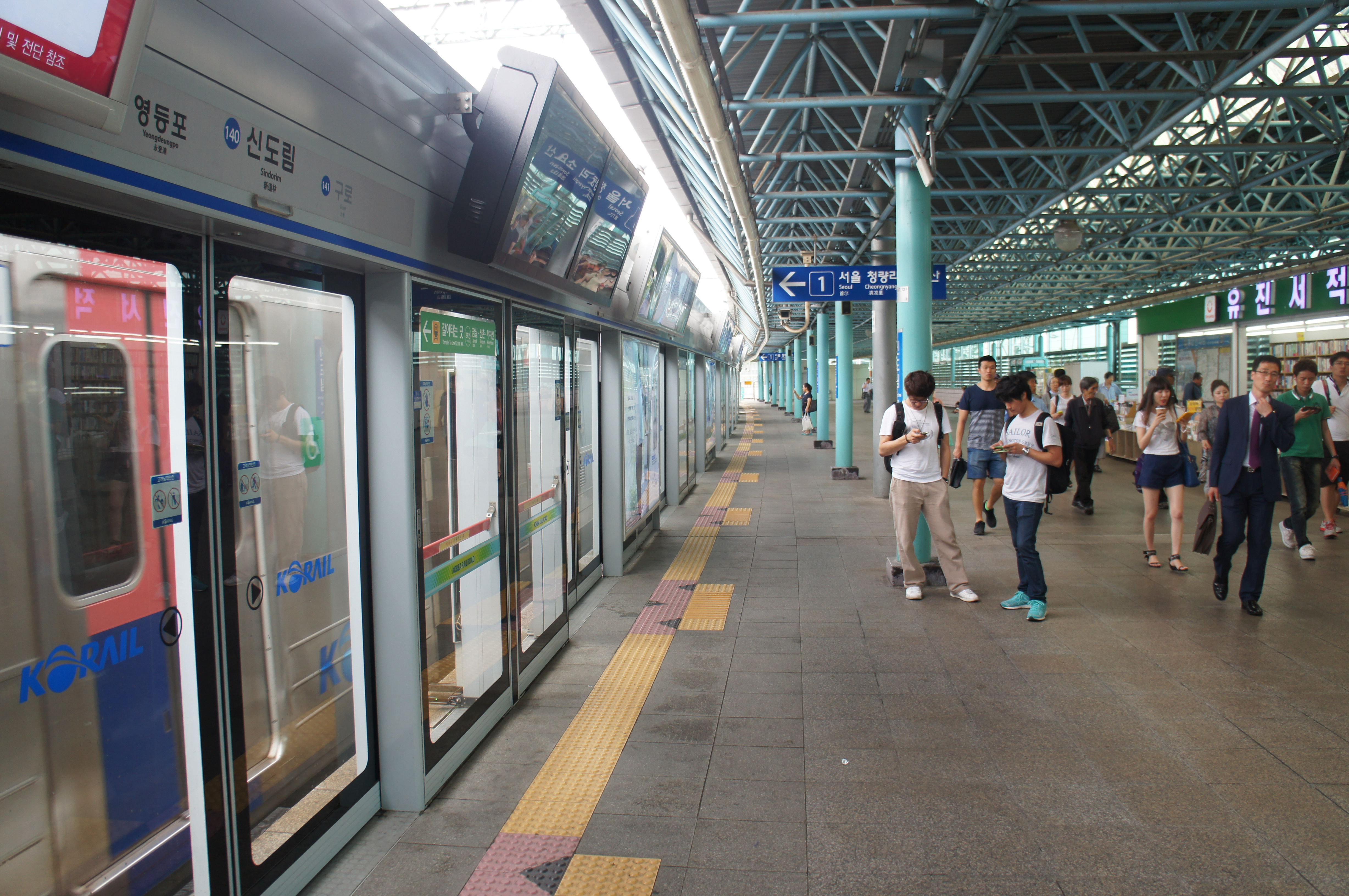 신도림역 1호선 승강장